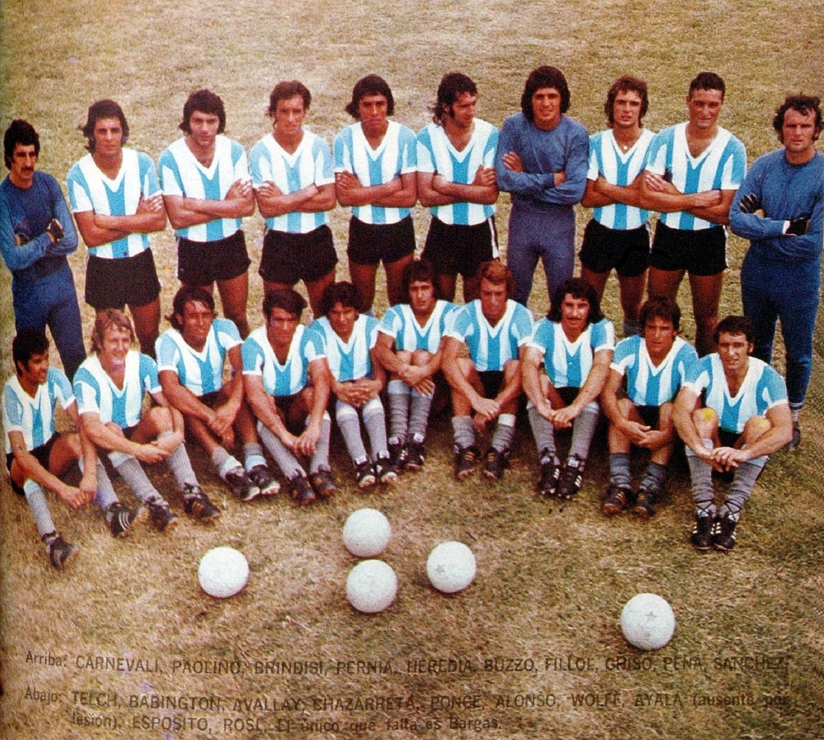 Historico triunfo del seleccionado argentino en Múnich - El Gráfico 2785 - Febrero de 1973